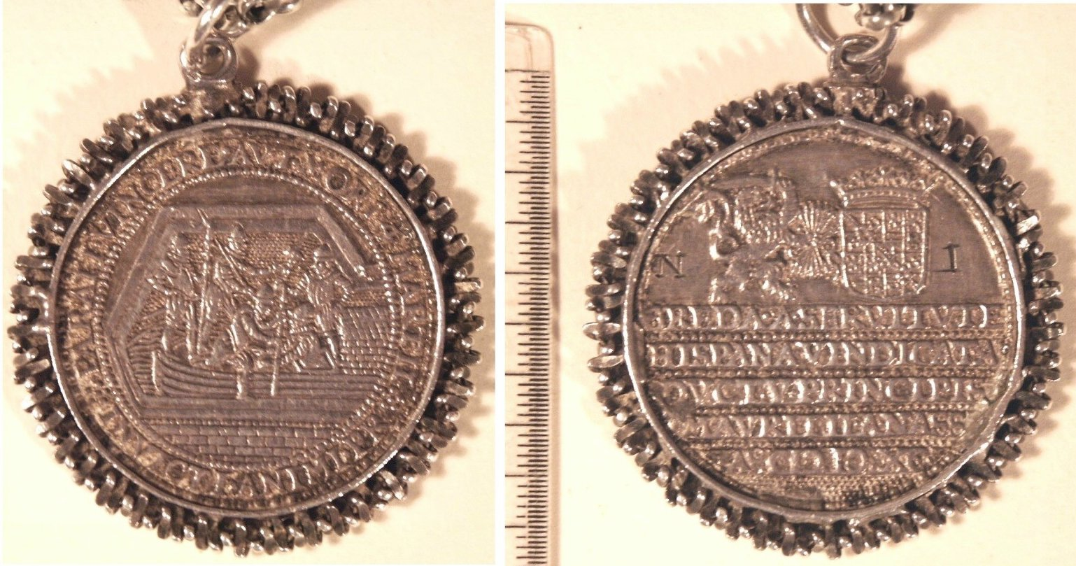 Penning op het succes van het turfschip Breda. Foto van eigen exemplaar.